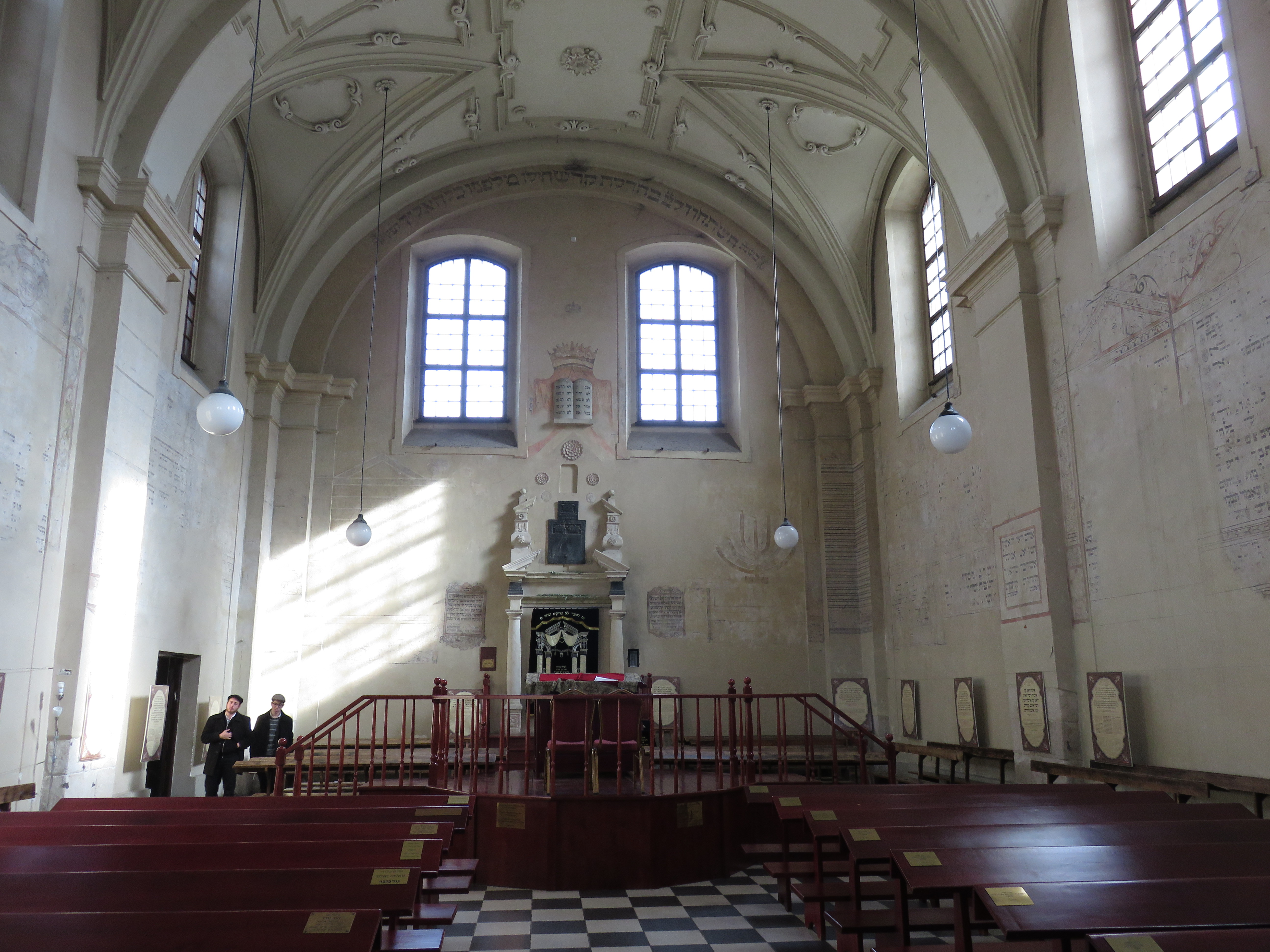 בית הכנסת אייזיק שוהל, קרקוב - פנים (7).jpg